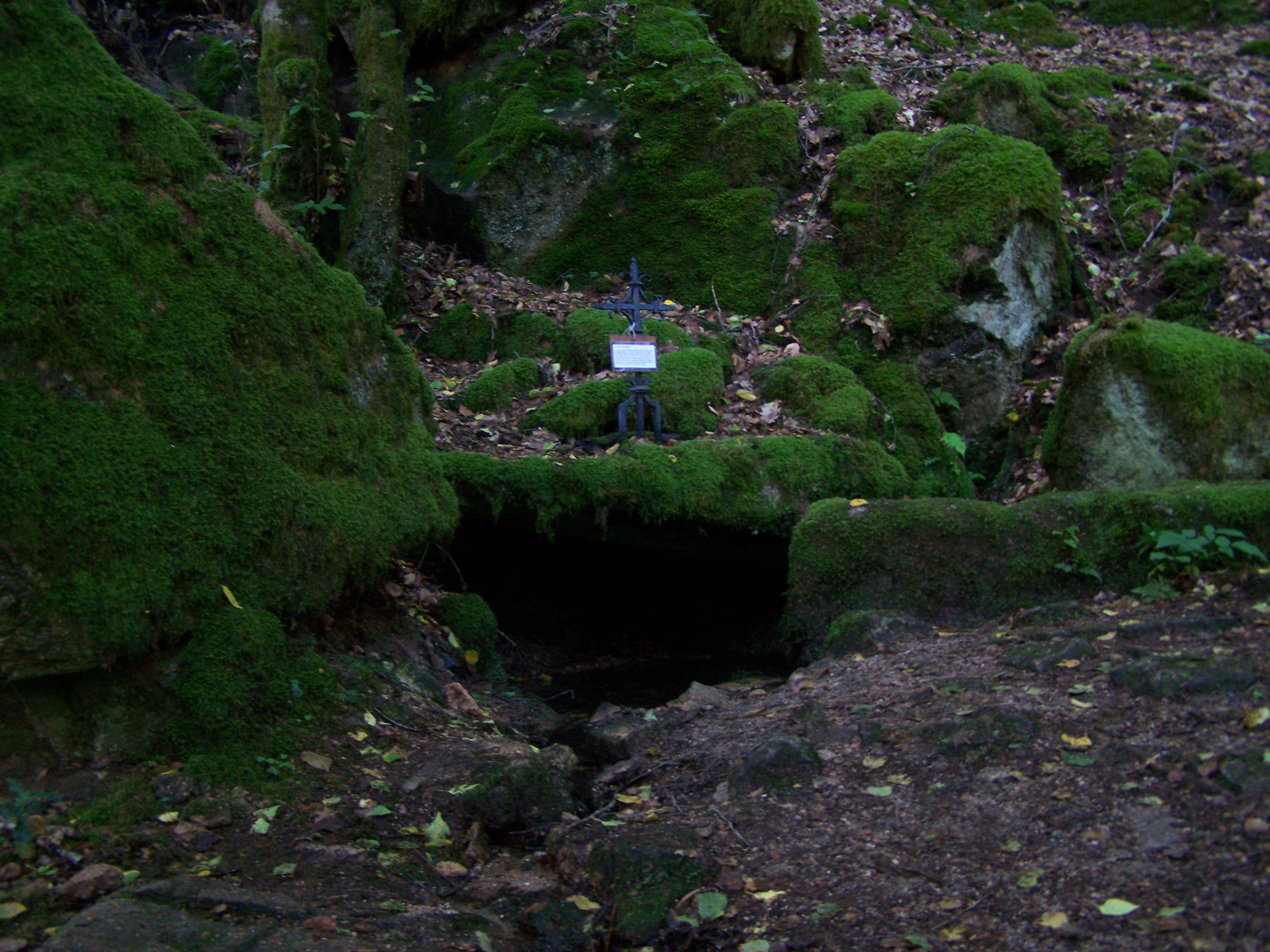 La "Fontaine Sainte-Marie" près de la chapelle de Faubouloin dans la commune de Corancy (Nièvre, France).